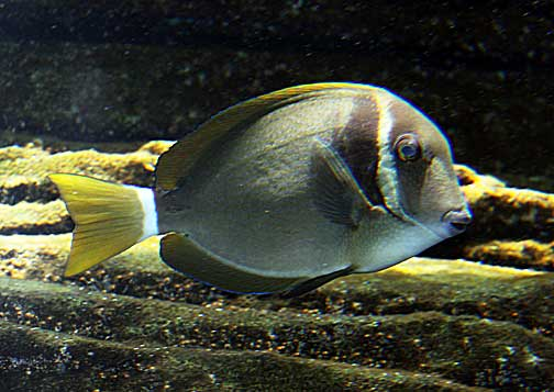 A. leucopareius en Hawái